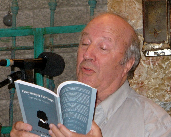 עמוס לויתן